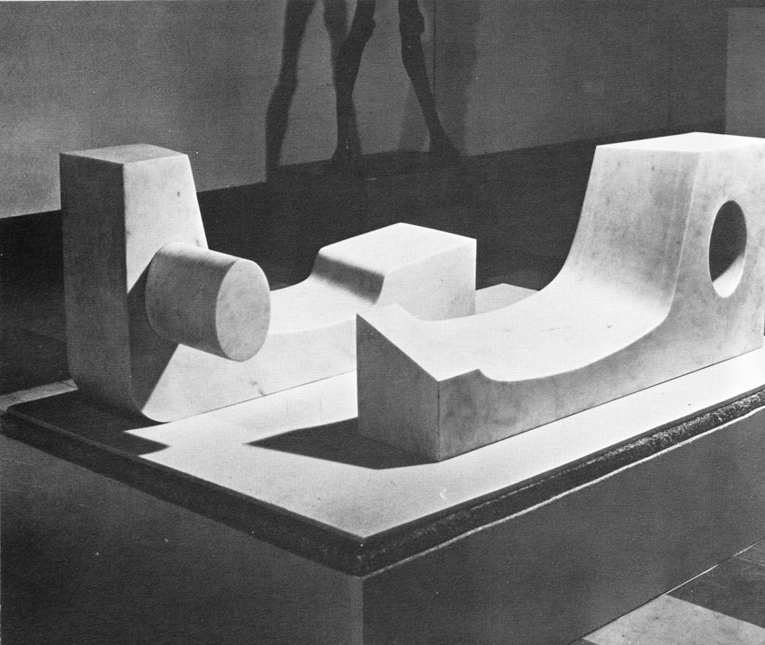 Impossibilità di incontrarsi - marble - 1971